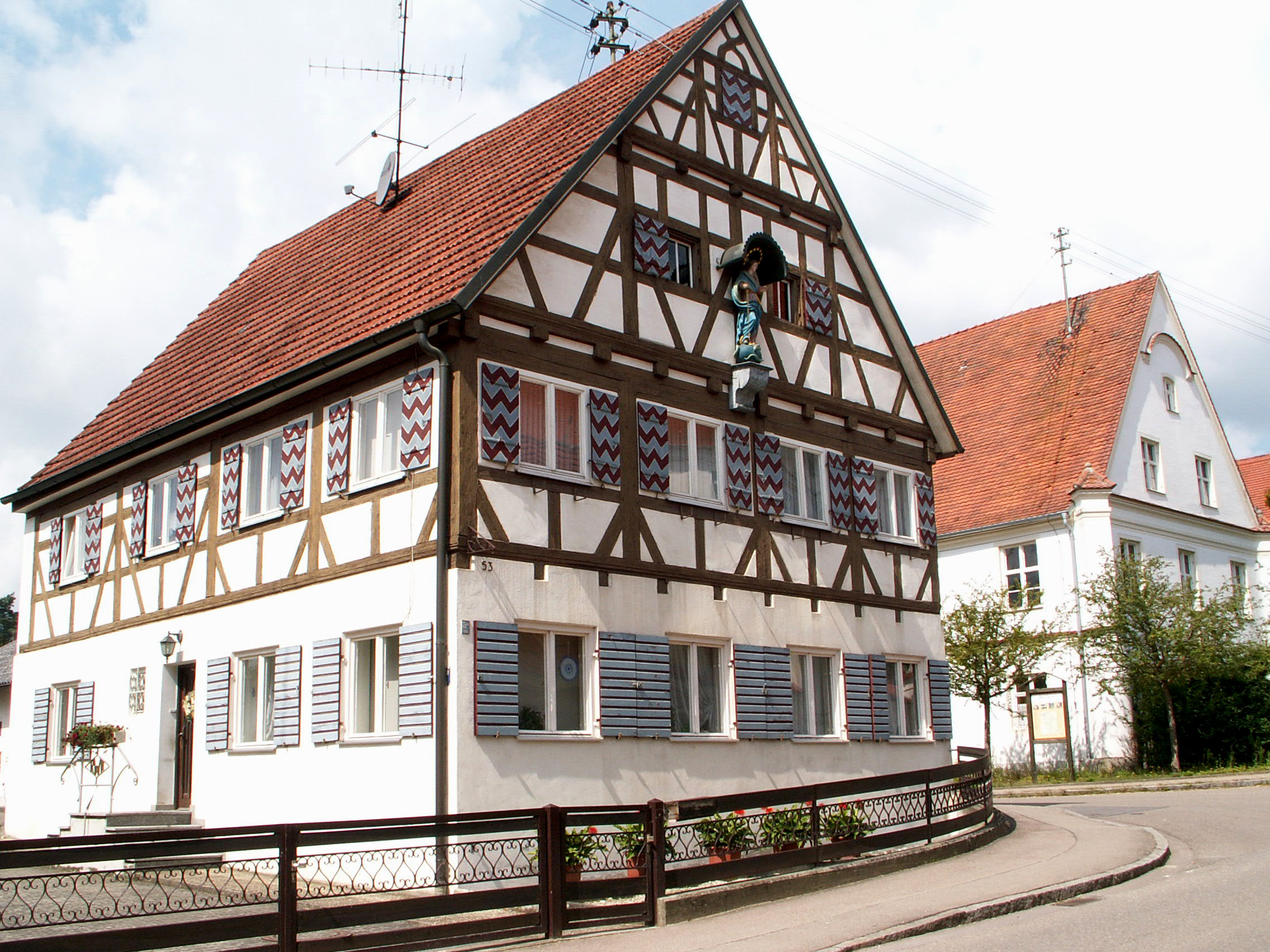 Dossenberger Str. 53 in Wettenhausen, Kammeltal